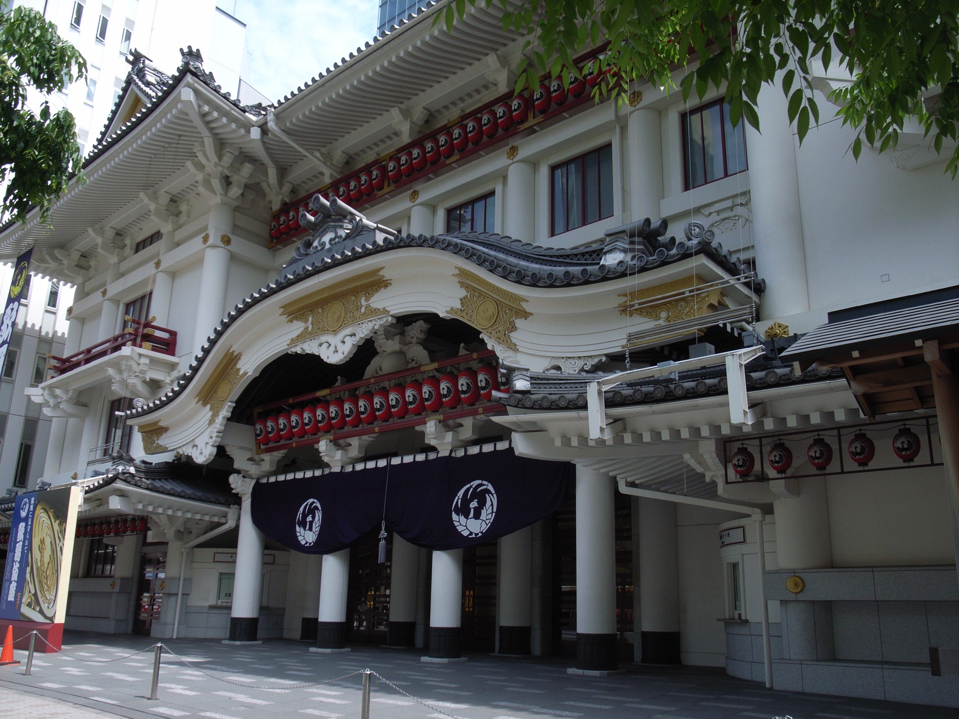 新型コロナウイルスで休業中の歌舞伎座。